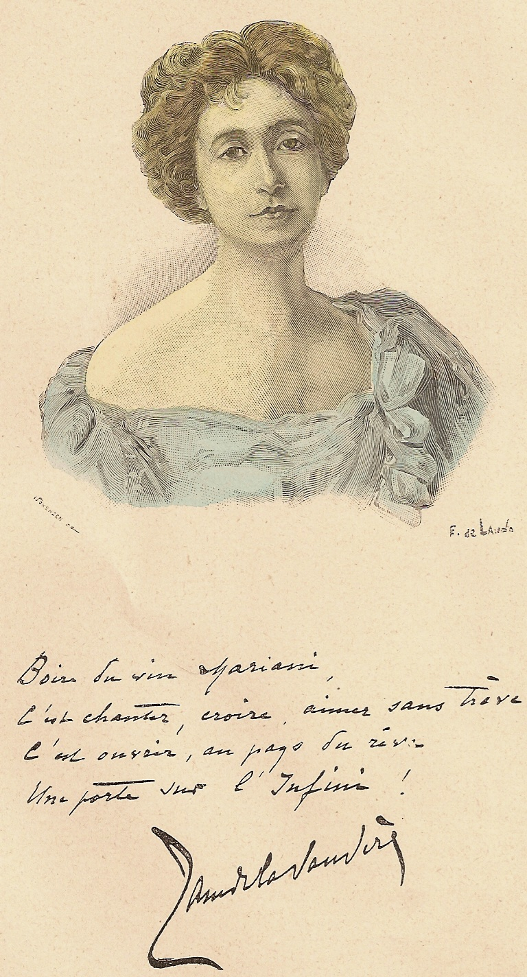 Copie d'une gravure publicitaire d'E. de Lauda représentant J. de La Vaudère